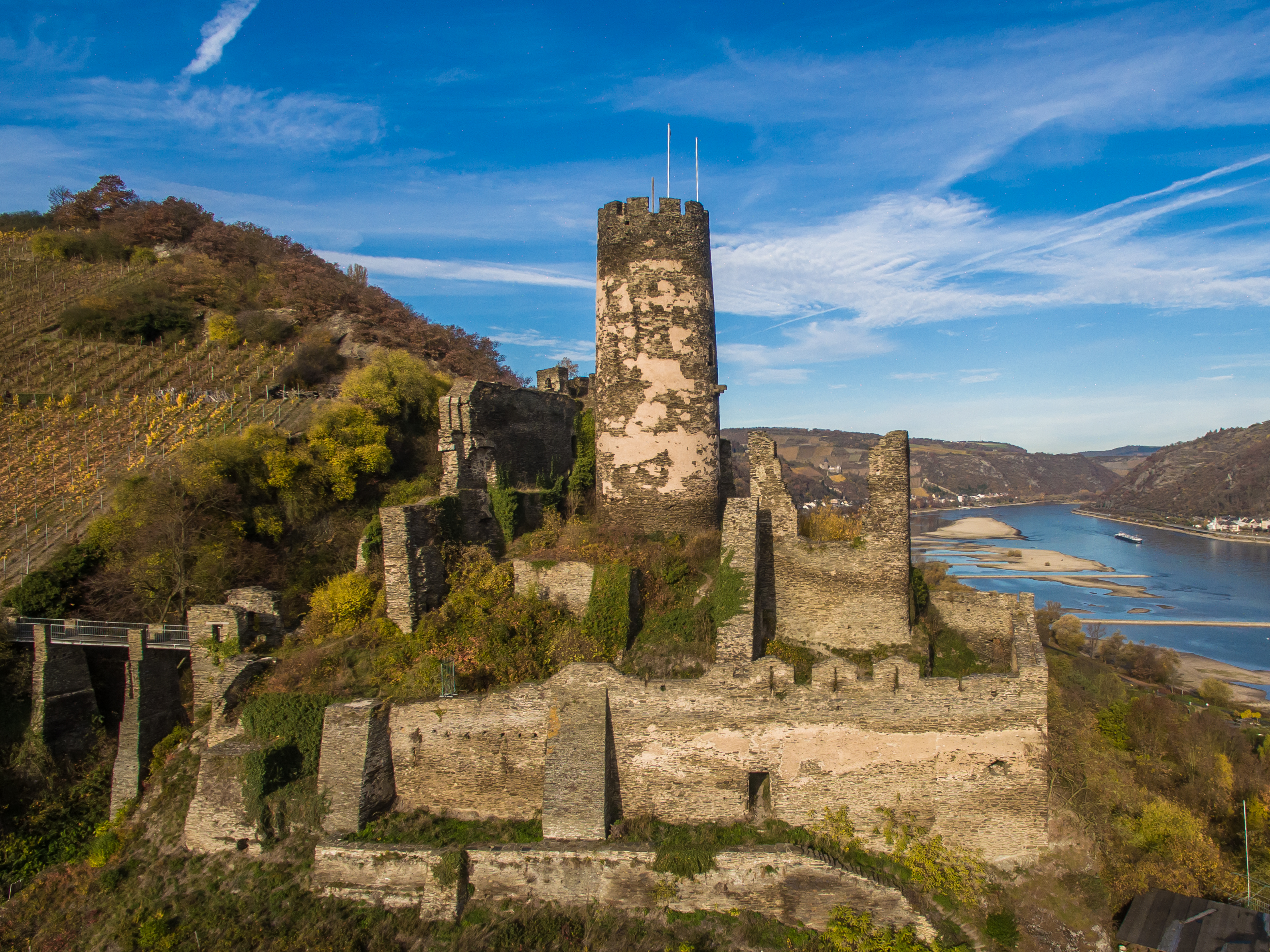 Burg Fürstenberg in Rheindiebach